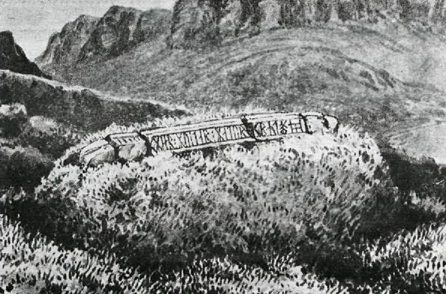 Leiði Kjartans Ólafssonar í ferðabók Collingwoods